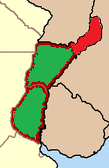 El territorio de la república comprendía las provincias de Entre Ríos, Corrientes y Misiones; la provincia de misiones invadida y en constante lucha contra el Imperio Portugués